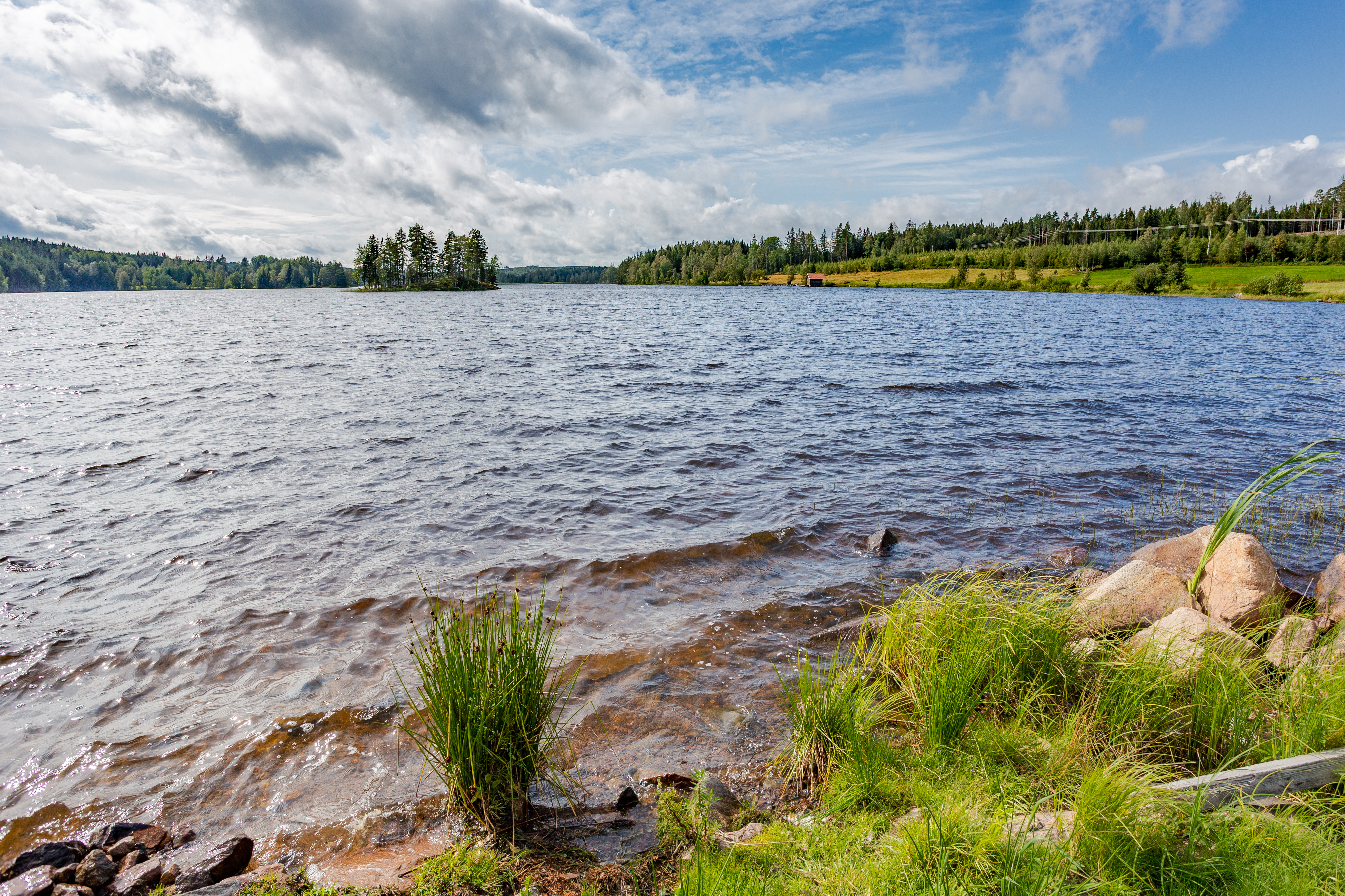 Sjön Dormen, Hedemora kommun, Dalarnas län, Sverige